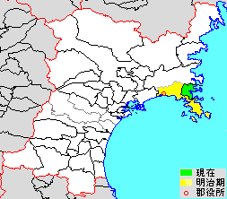 明治期の牡鹿郡の位置。